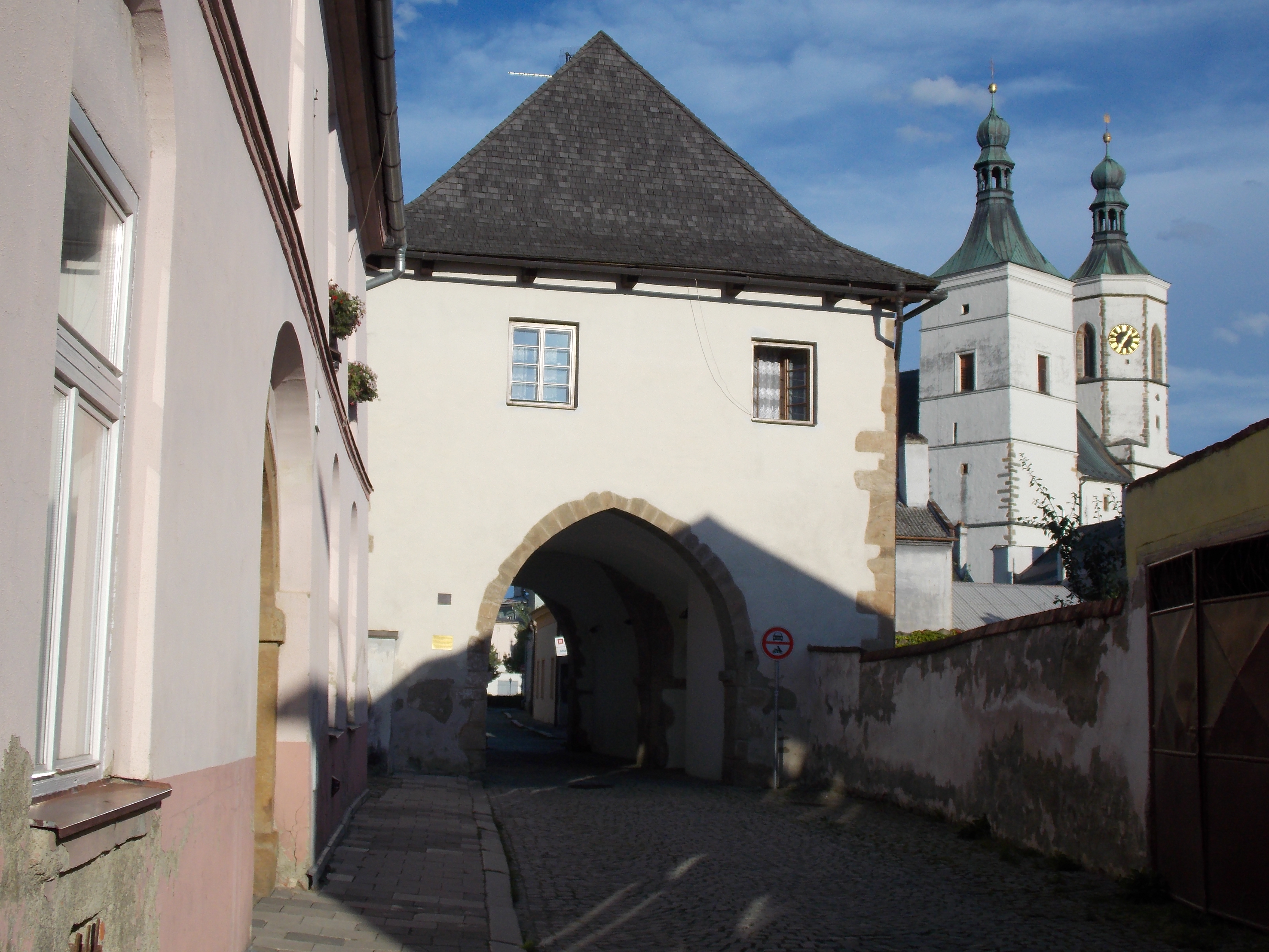 Městské opevnění, z toho jen: Medelská brána (Uničov), Medelská ul. 125/10, Uničov